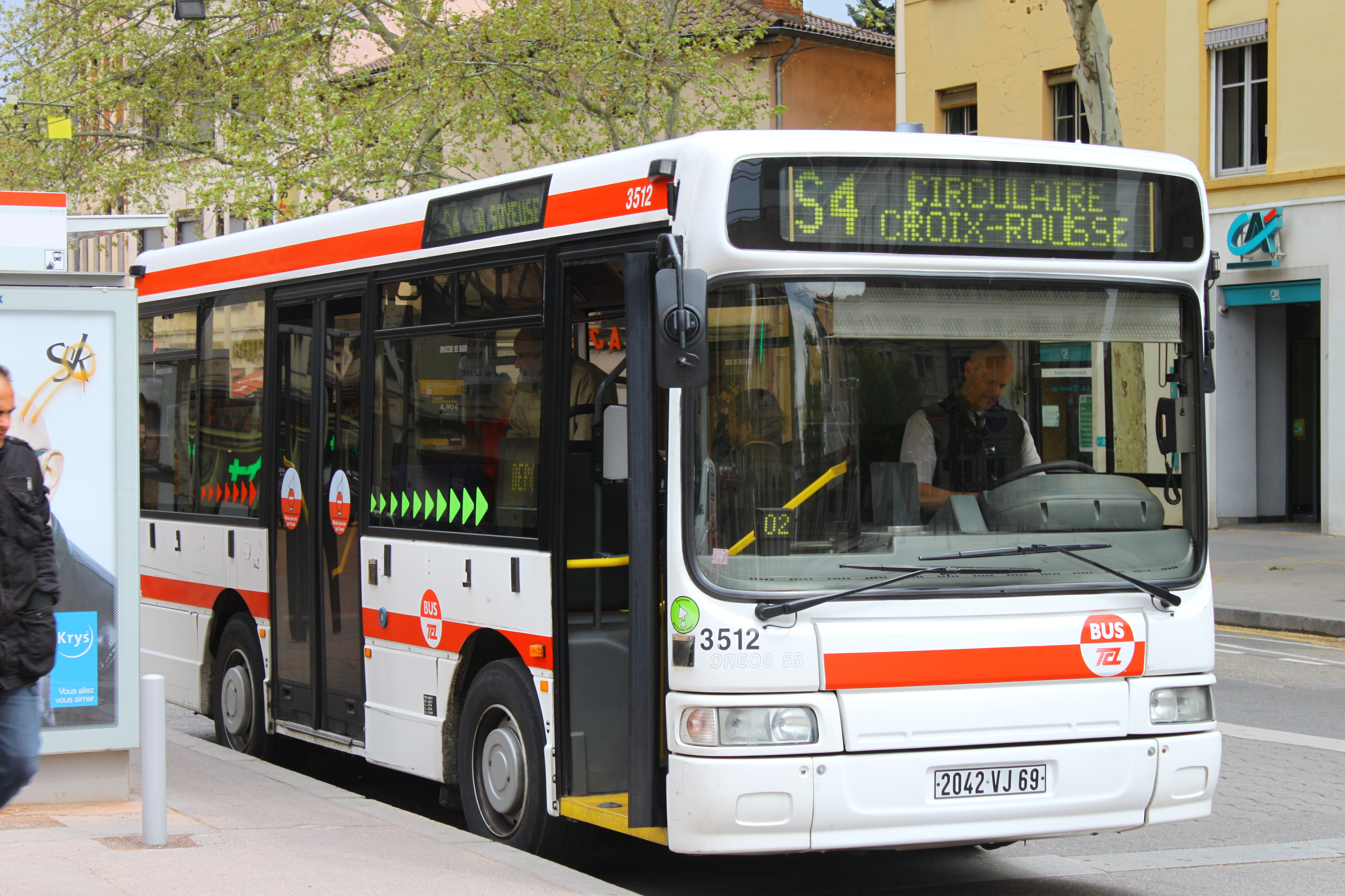 Gépébus Oréos 55 sur le Ligne S4 des TCL, station Croix-Rousse